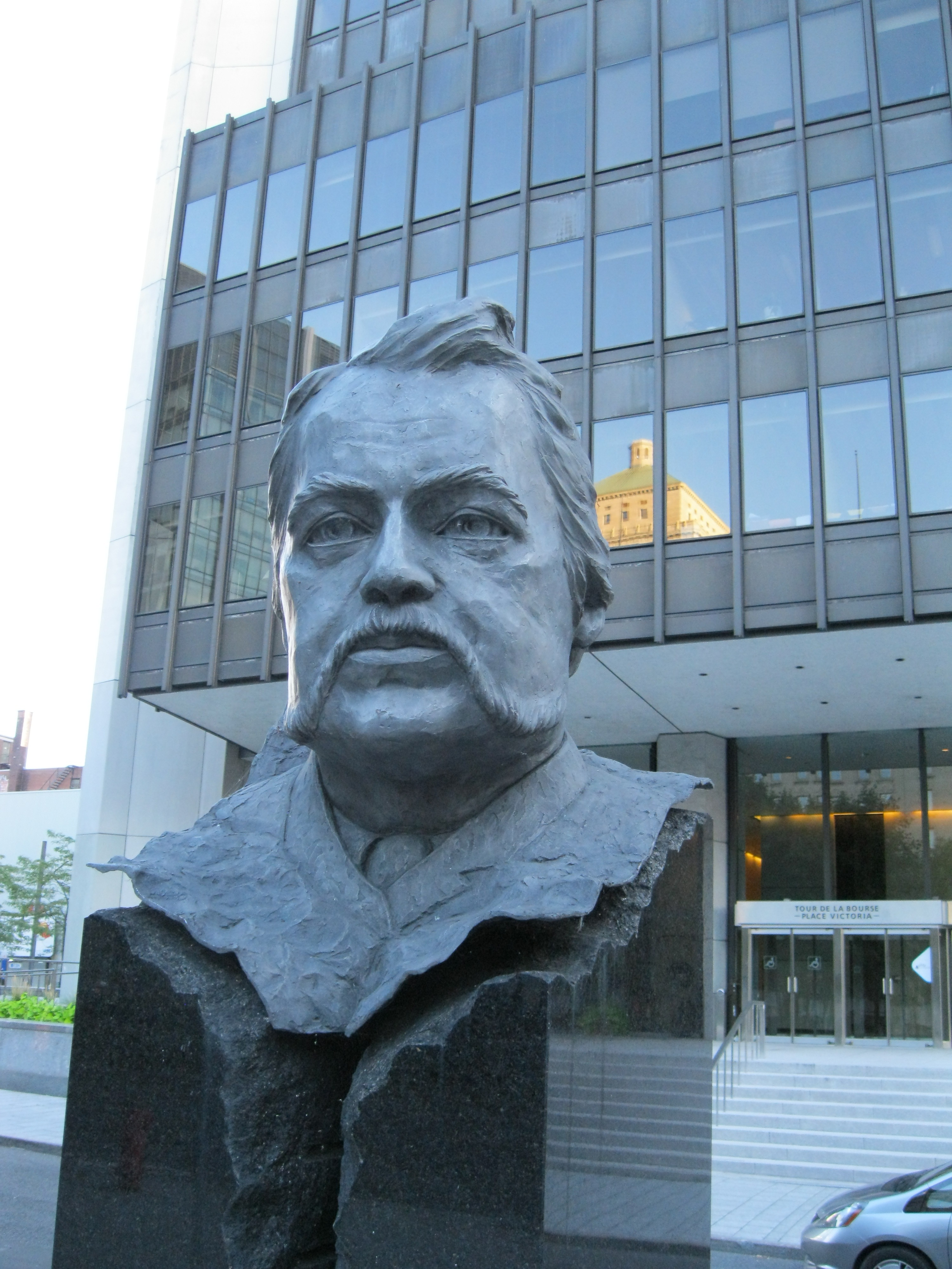 Joseph-Xavier Perrault (1838-1905) est le fondateur de la Chambre de Commerce de Montréal, en 1886. Le buste de Perrault, réalisé en 1987 par Jules Lasalle, est un moulage d'aluminium, encavé dans un socle fait d'un bloc de granite noir poli et fendu en deux. D'abord érigé devant le Centre de commerce mondial de Montréal, il est depuis le réaménagement du square Victoria devant la tour de la Bourse. Ville de Montréal - Art public